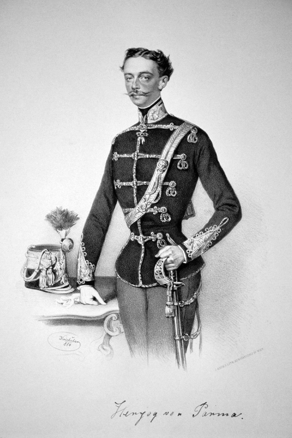 Ferdinand Karl III. von Parma (1823-1854) Lithographie von Josef Kriehuber, 1854